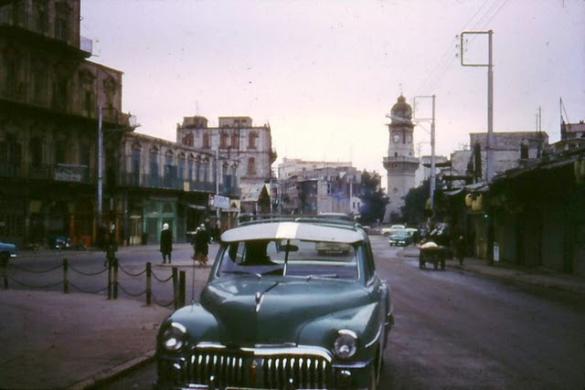 Syrien 1961 - Aleppo im Mittagsschlaf